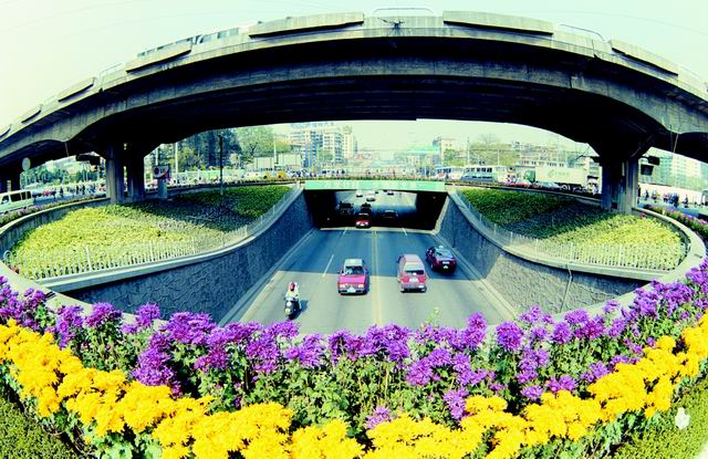 1986年扩建后的大北立交